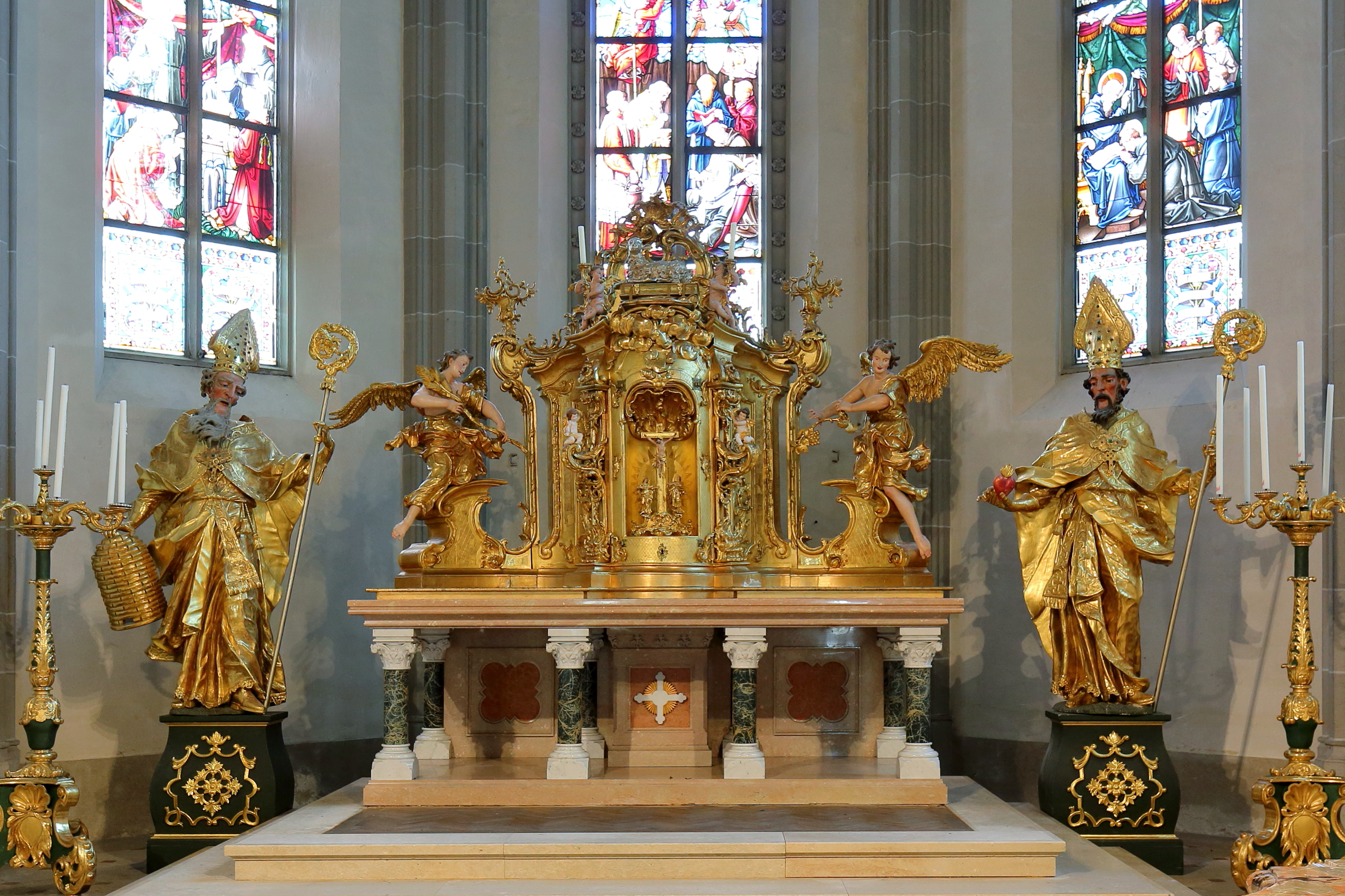 Der Tabernakel der Pfarrkirche hl. Gallus in der oberösterreichischen Marktgemeinde Schörfling am Attersee. Die zwei lebensgroße Barockstatuen zur linken und rechten Seite das Tabernakel stellen den hl. Ambrosius mit Bienenkorb und den hl. Augustinus mit brennendem Herz dar.